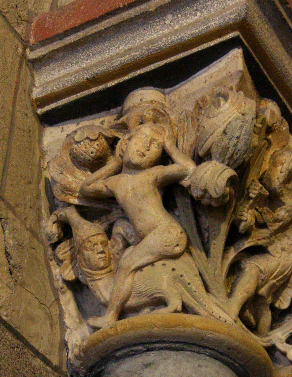 Abteikirche Maria Laach - Eva reitet im Paradies auf der Schlange, welche eine Narrenkappe trägt/Abbey Maria Laach - Eve rides on the devil